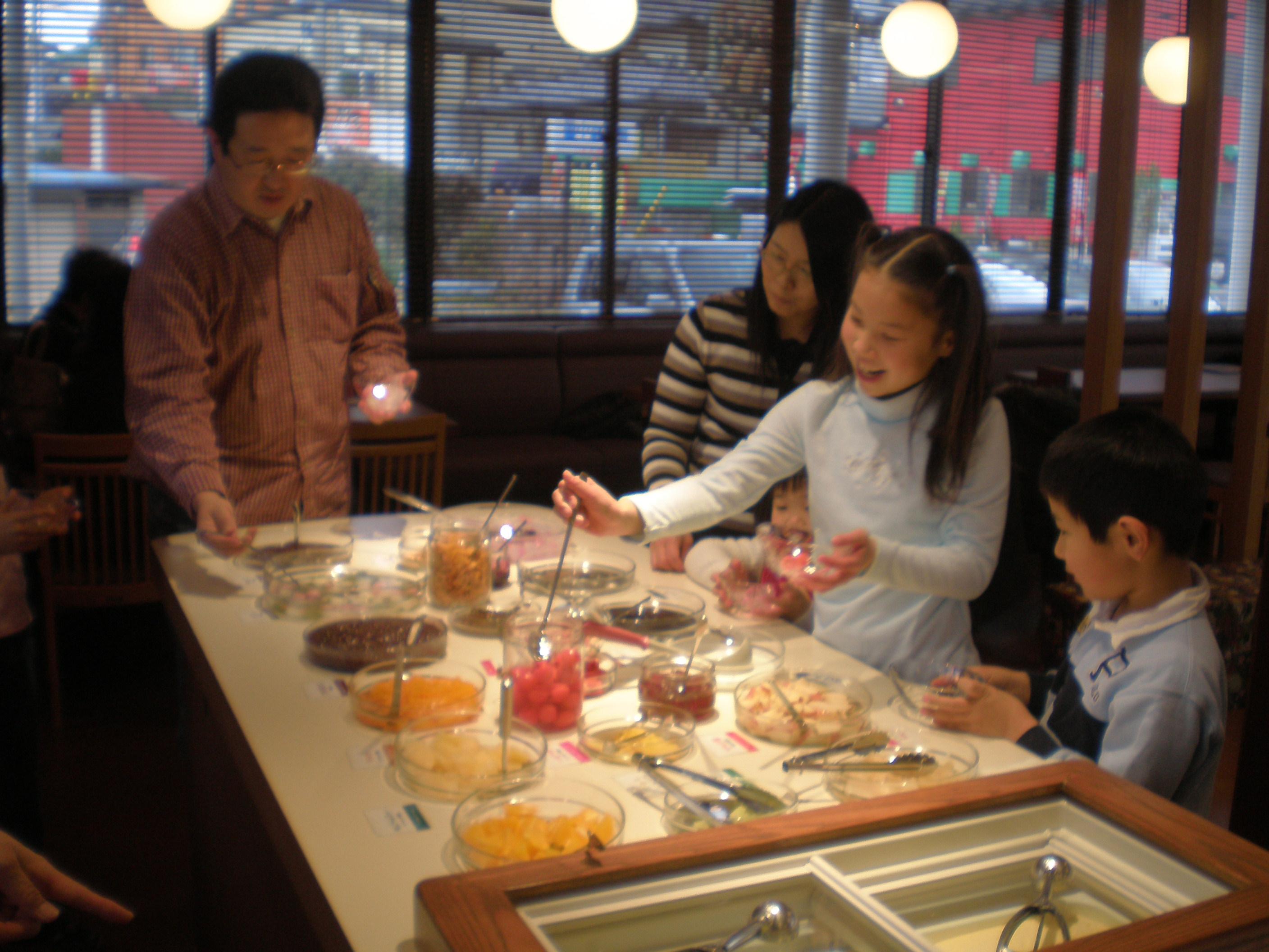 あんみつバー